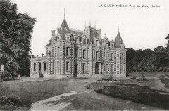 Château de la Gaudinière, Nantes